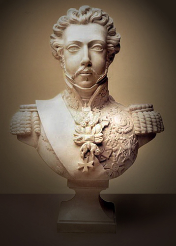 Cópia em biscuit de escultura em gesso de Marc Ferrez